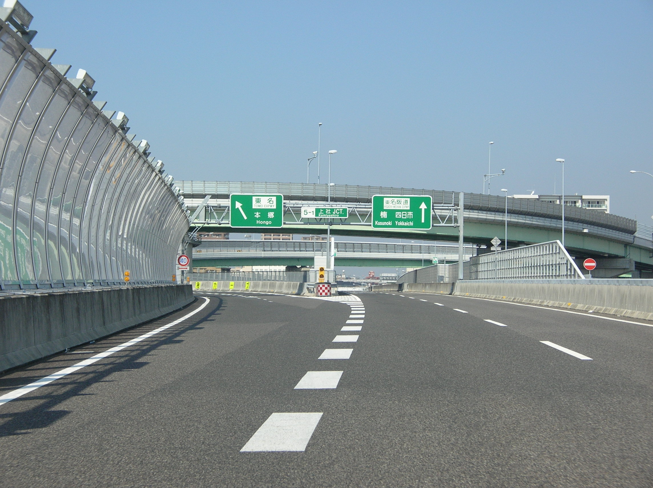 旧東名阪道時代の上社JCTにおける案内標識